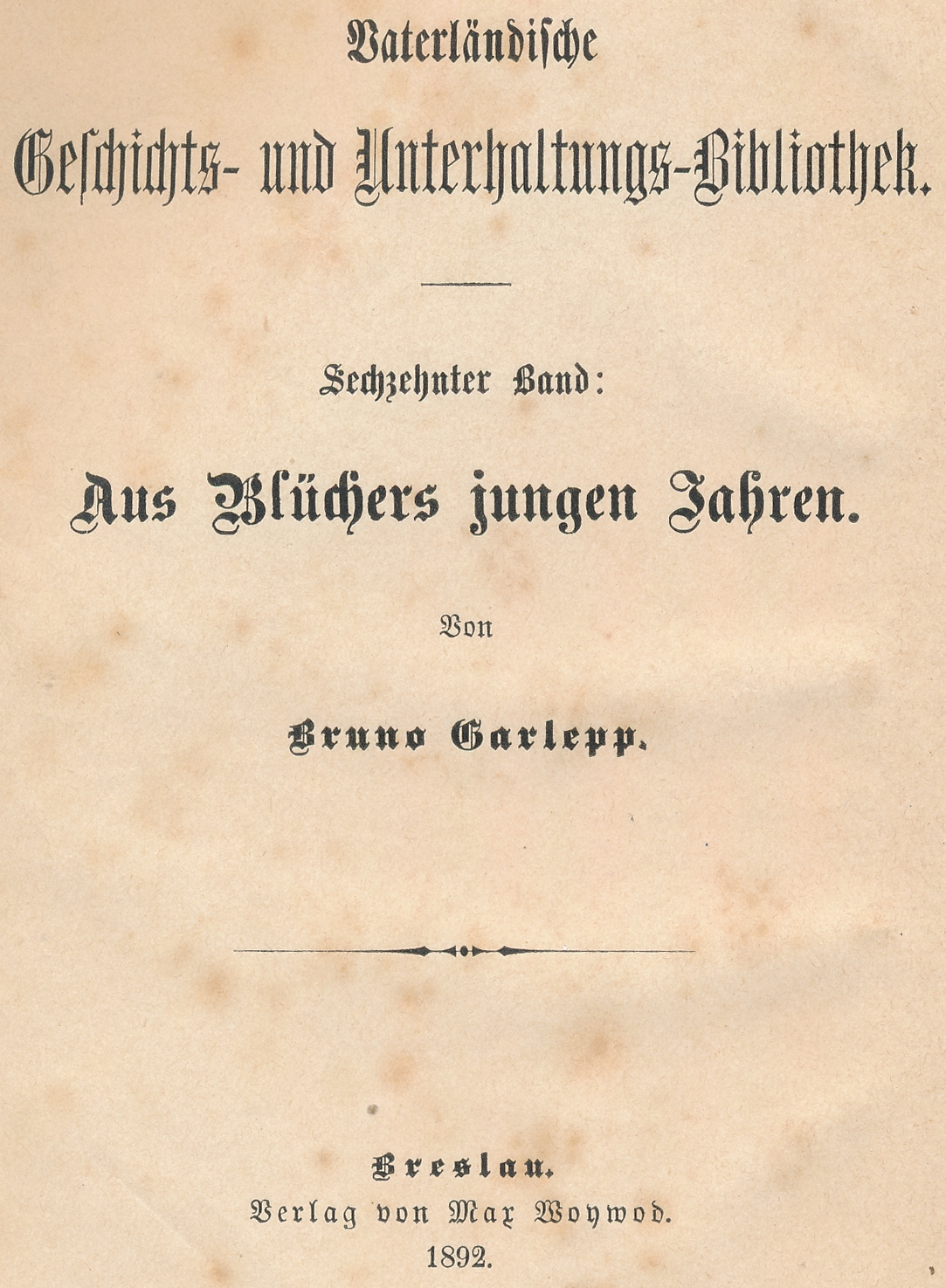 Bruno Garlepp: Aus Blüchers jungen Jahren. Geschichtliche Erzählung aus dem Leben des Marschalls Vorwärts. Zweite, verbesserte Auflage. Verlag von Max Woywod, Breslau 1892.